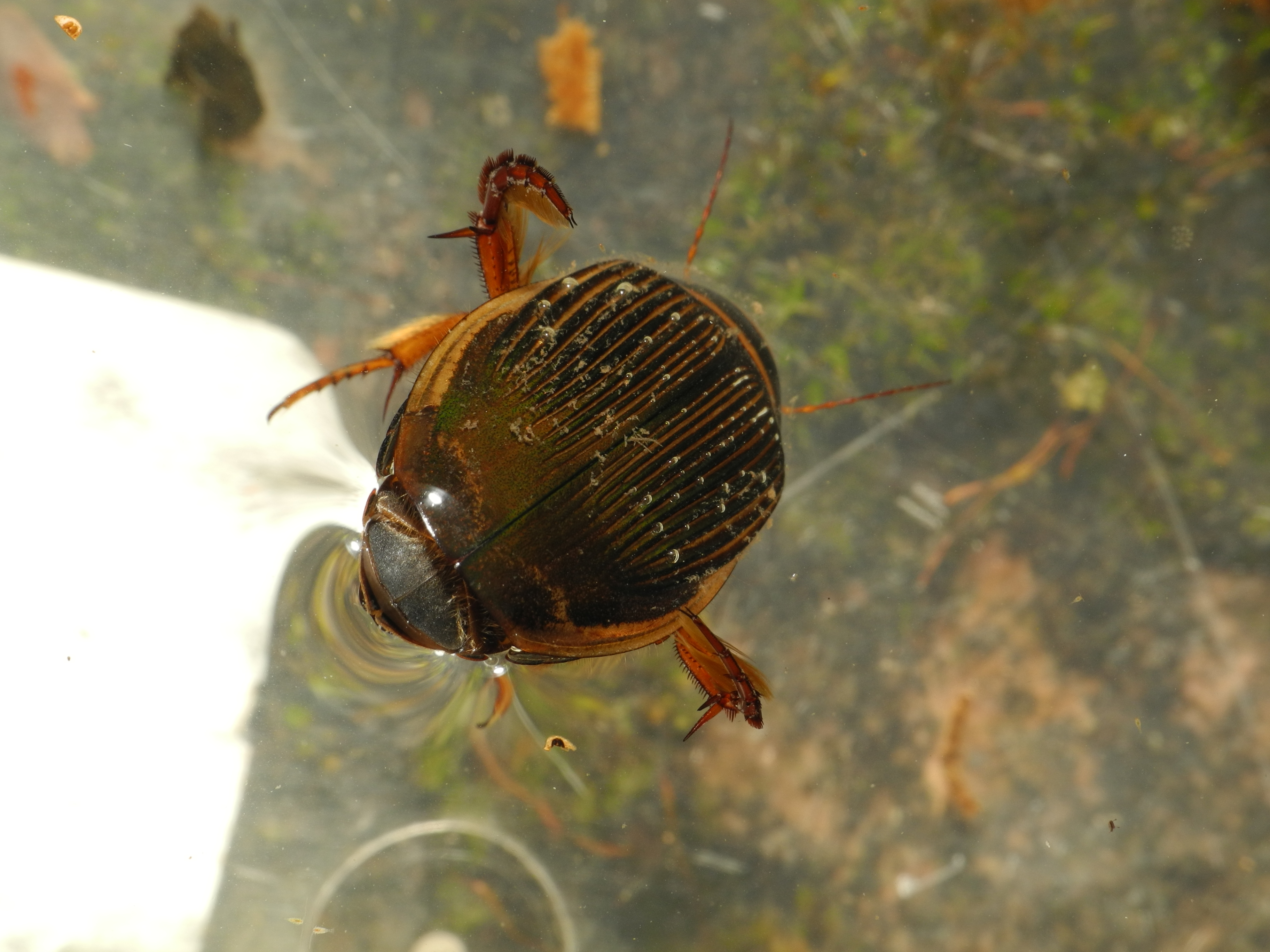 Dytique femelle (Dytiscidae sp.). Image prise avec la bonnette Raynox DCR-250.